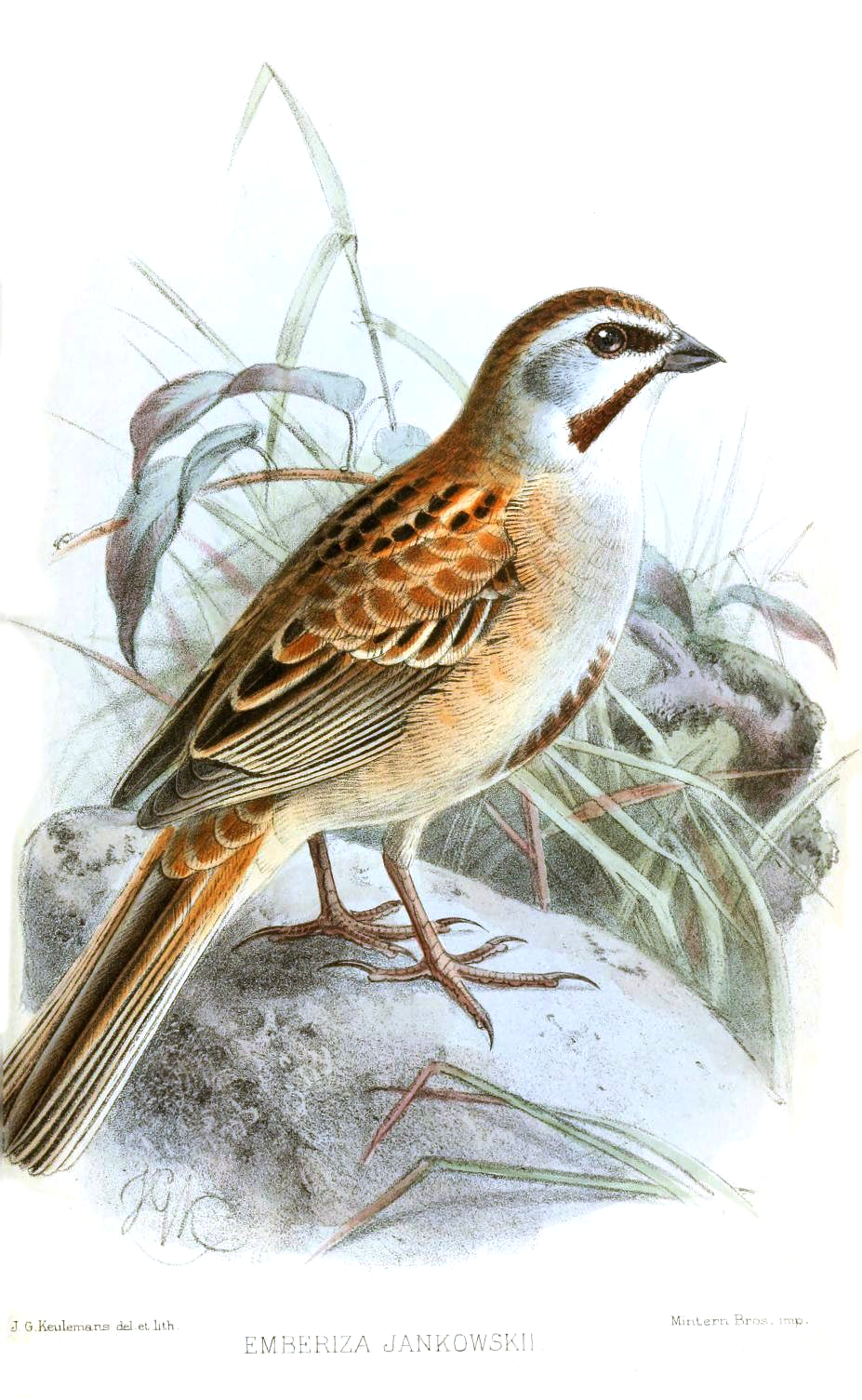 Emberiza jankowski